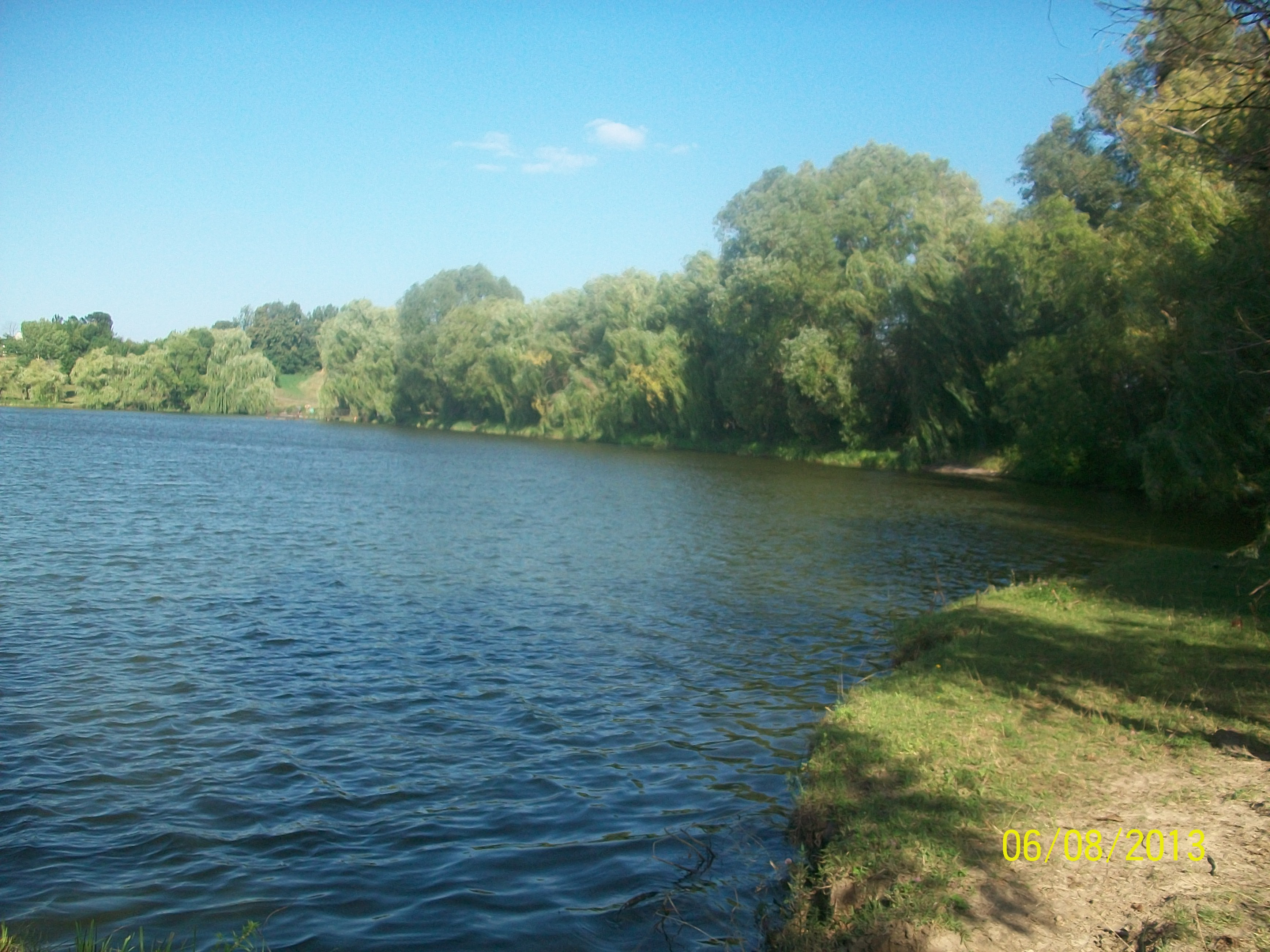 По обидва боки ставків тягнеться село двома довгими вулицями.